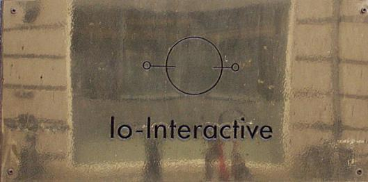 Plaketten på utsiden av IO Interactives gamle lokaler.